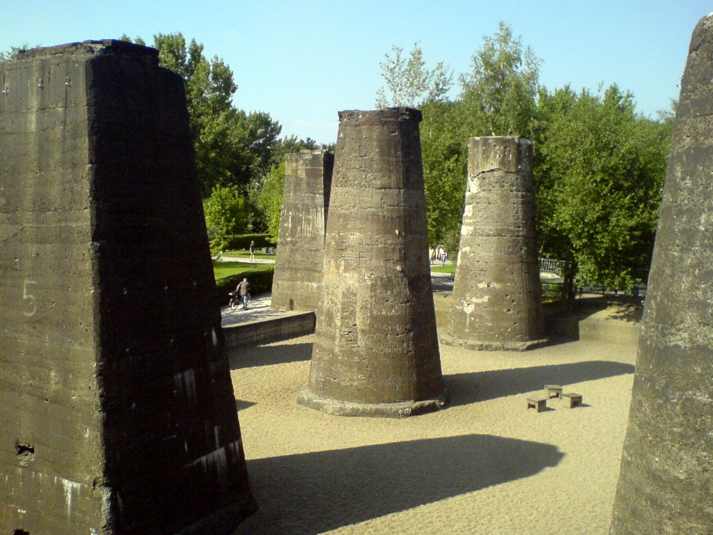 Klettern im Landschaftspark Duisburg-Nord